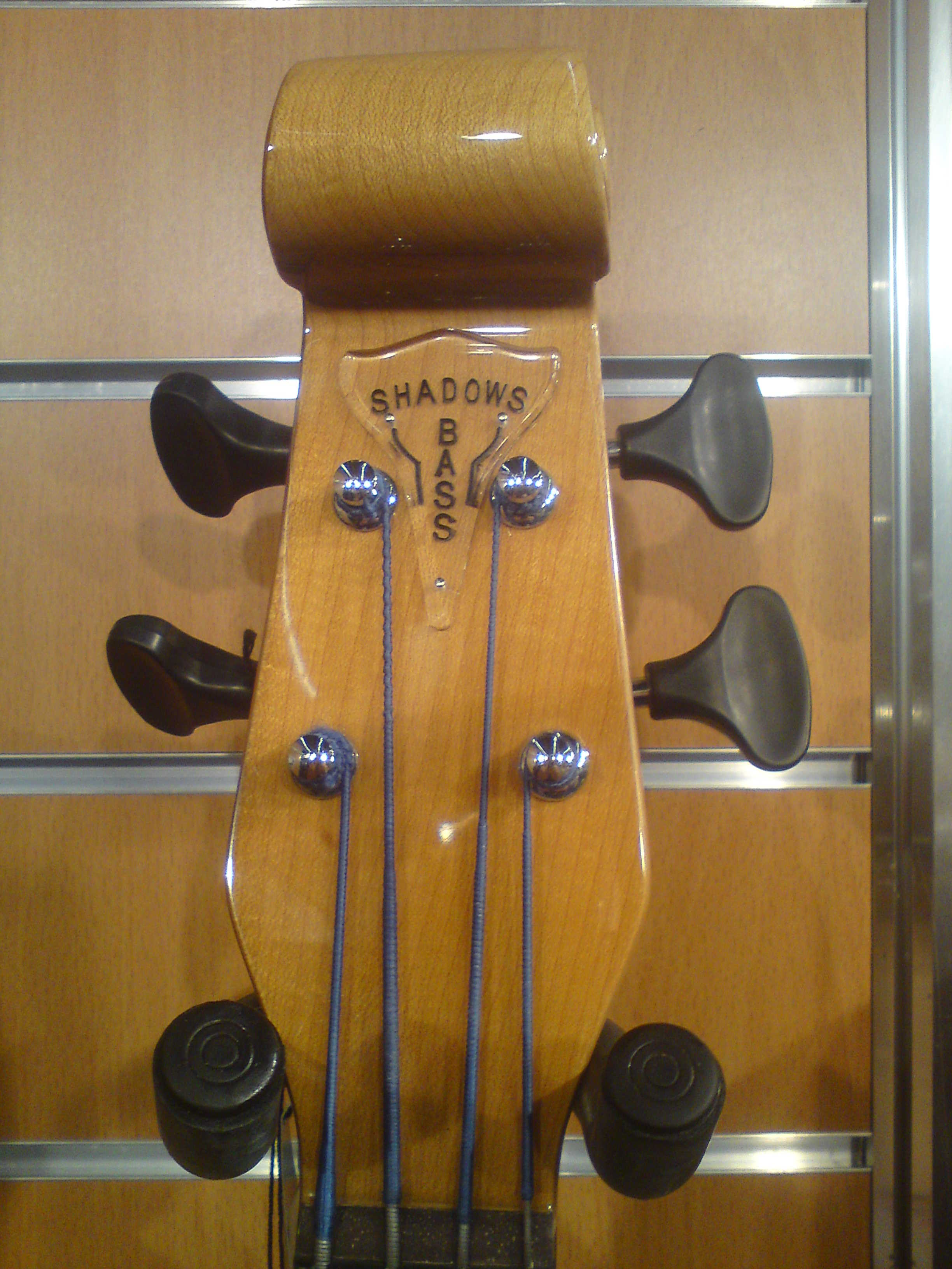 Scrollhead